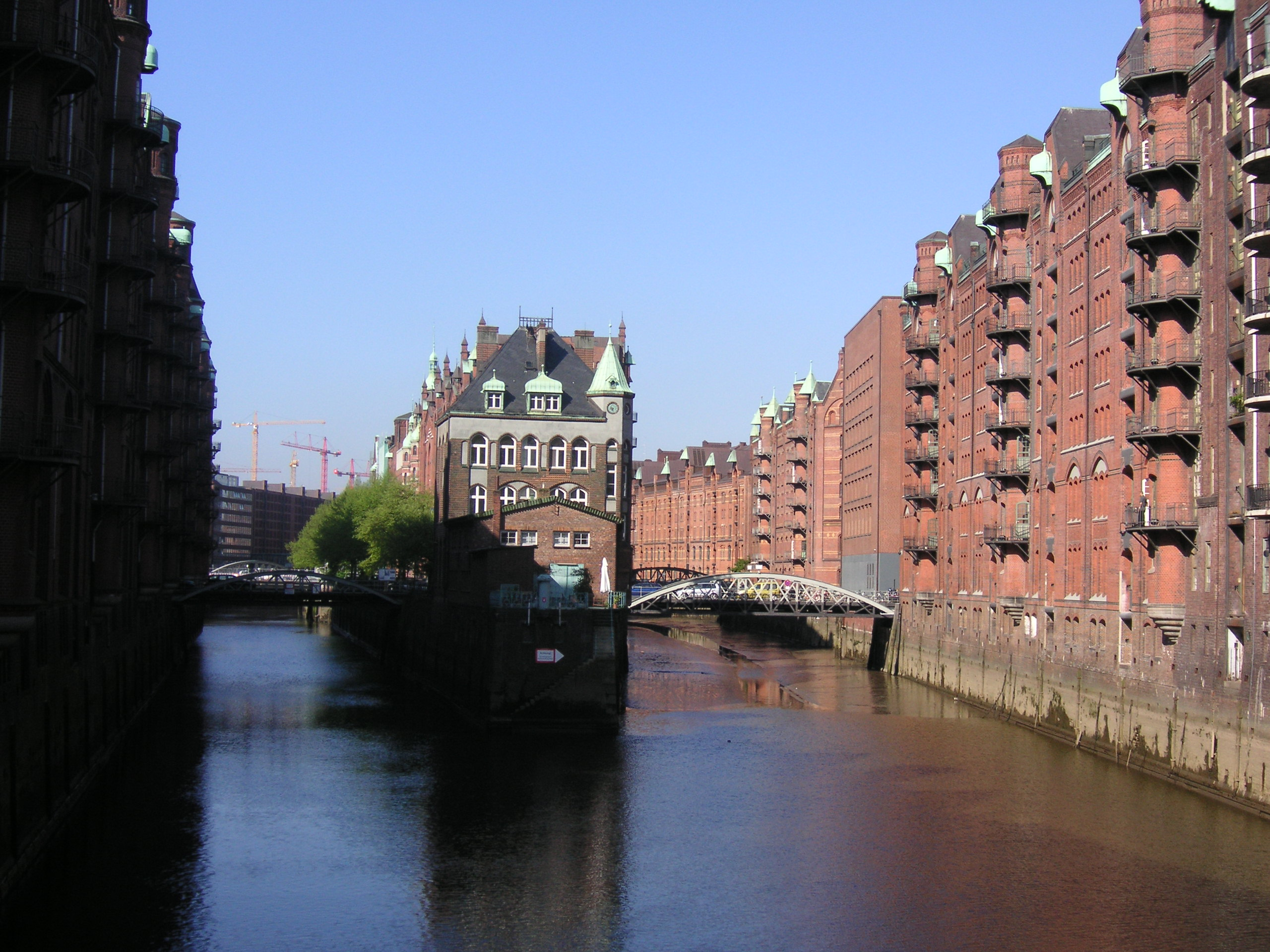 Speicherstadt in Hamburg 2008 This is a photograph of an architectural monument.